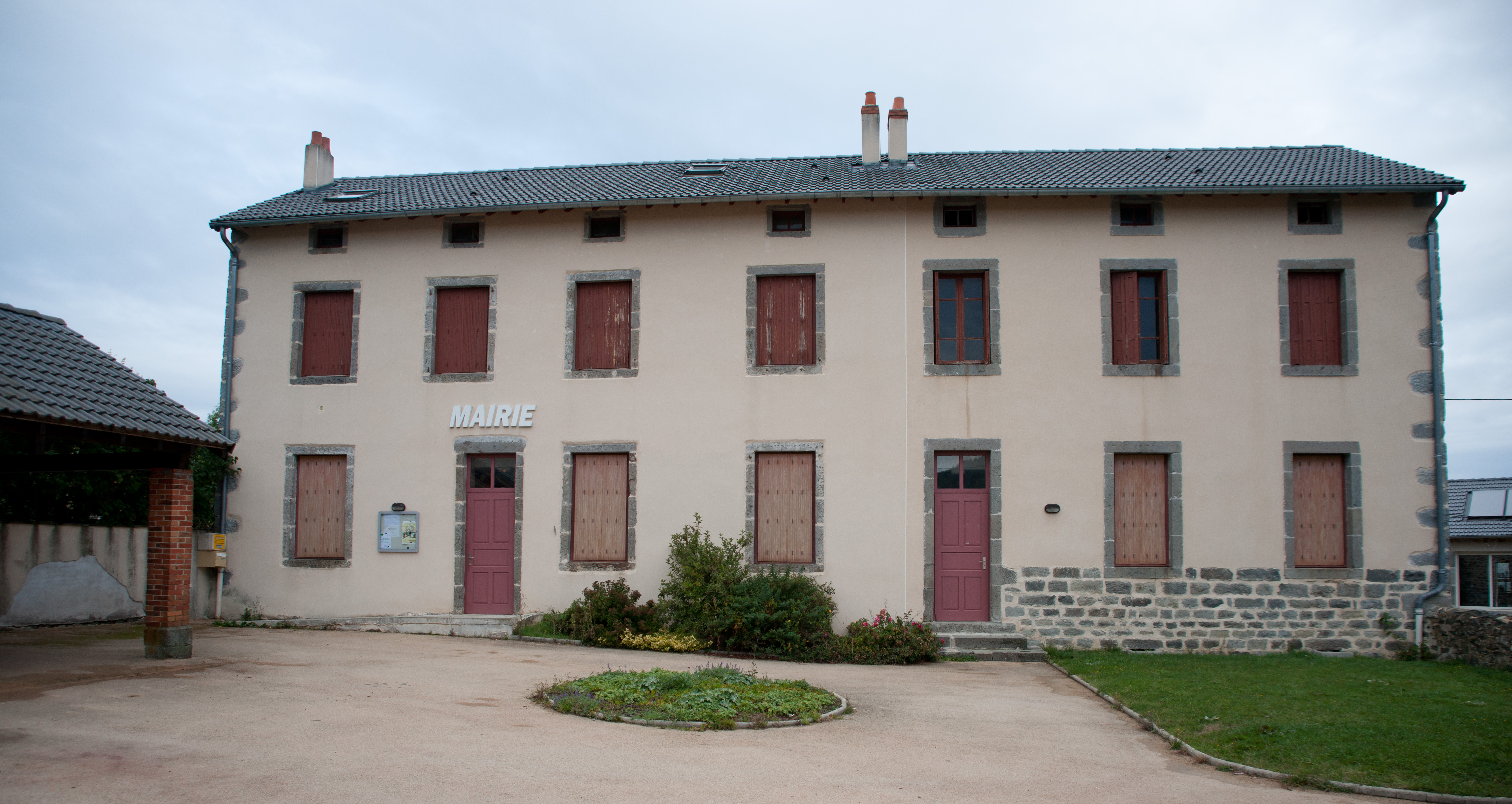 Mairie de Bessamorel